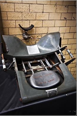 le pulmoventilateur du Professeur Charles Hederer